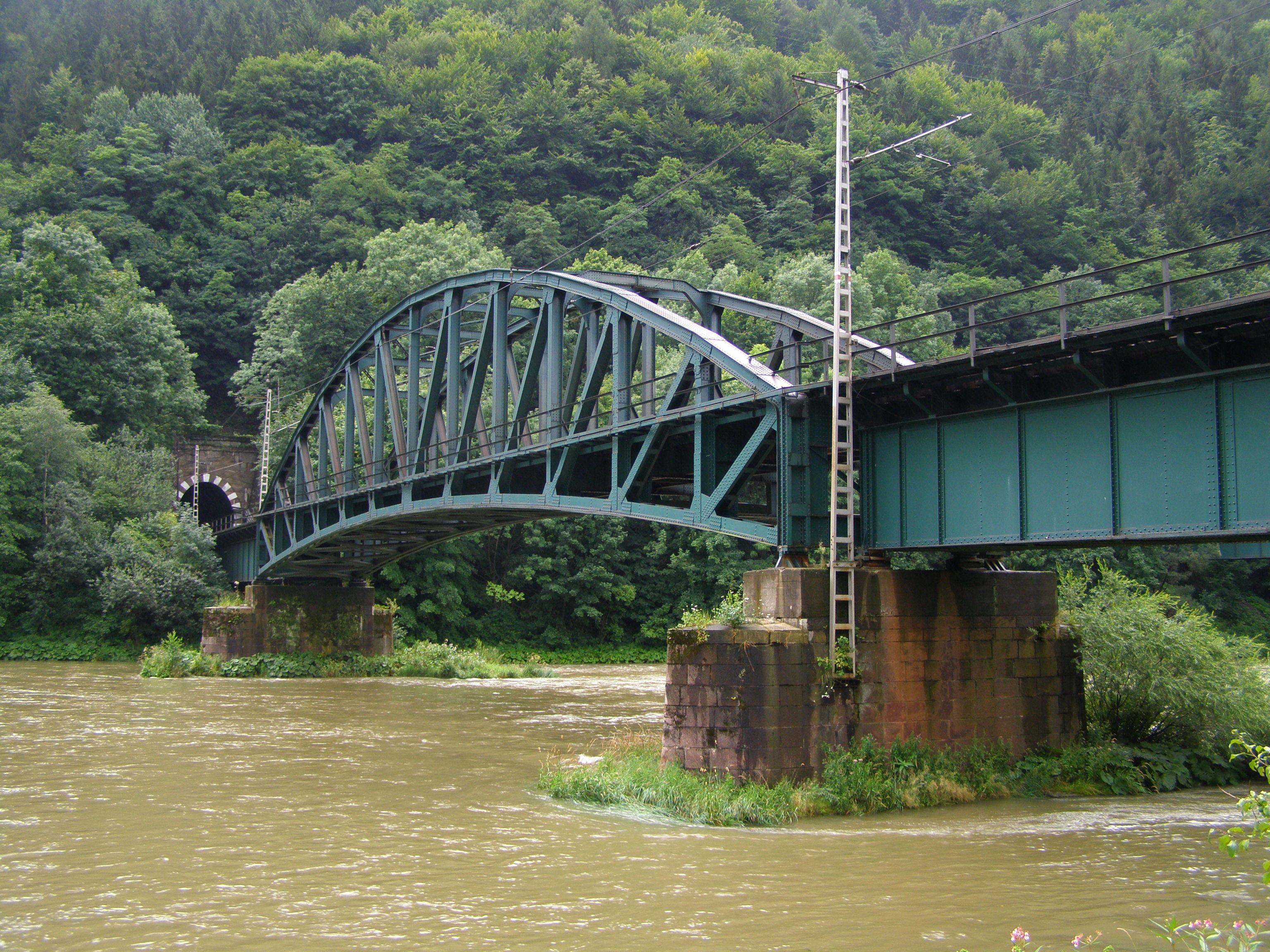 Domašínsky meander, železniční tunel a most nad Váhem